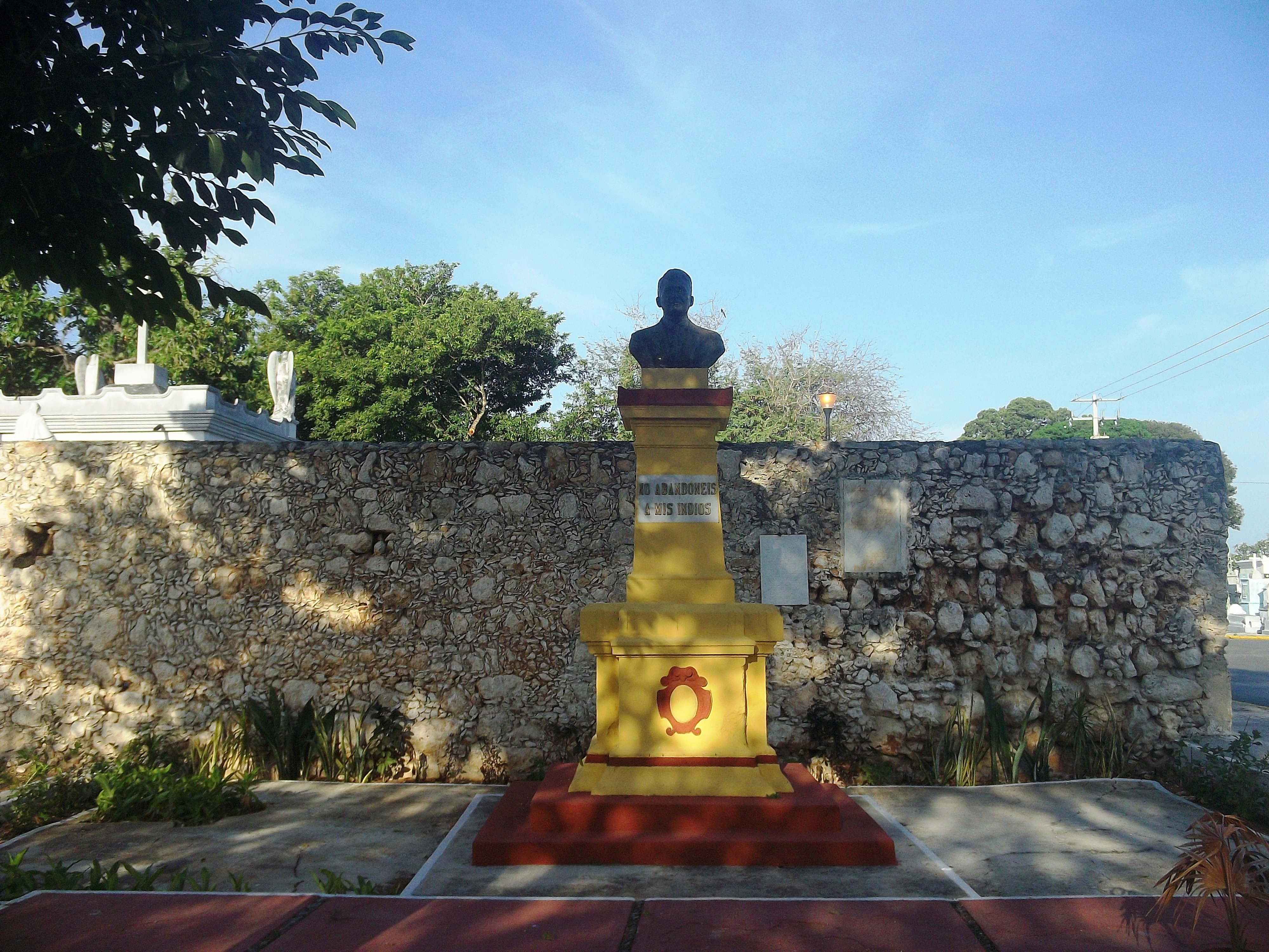 Busto a Felipe Carrilo Puerto, Cementerio General, Mérida, Yucatán.